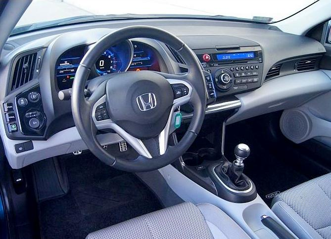 Wnętrze CR-Z